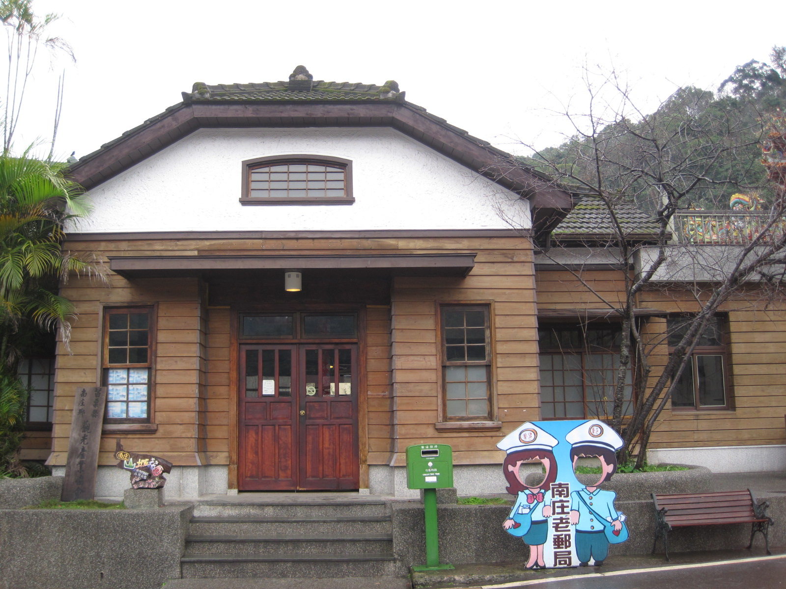 臺灣苗栗縣南庄鄉南庄郵便局。